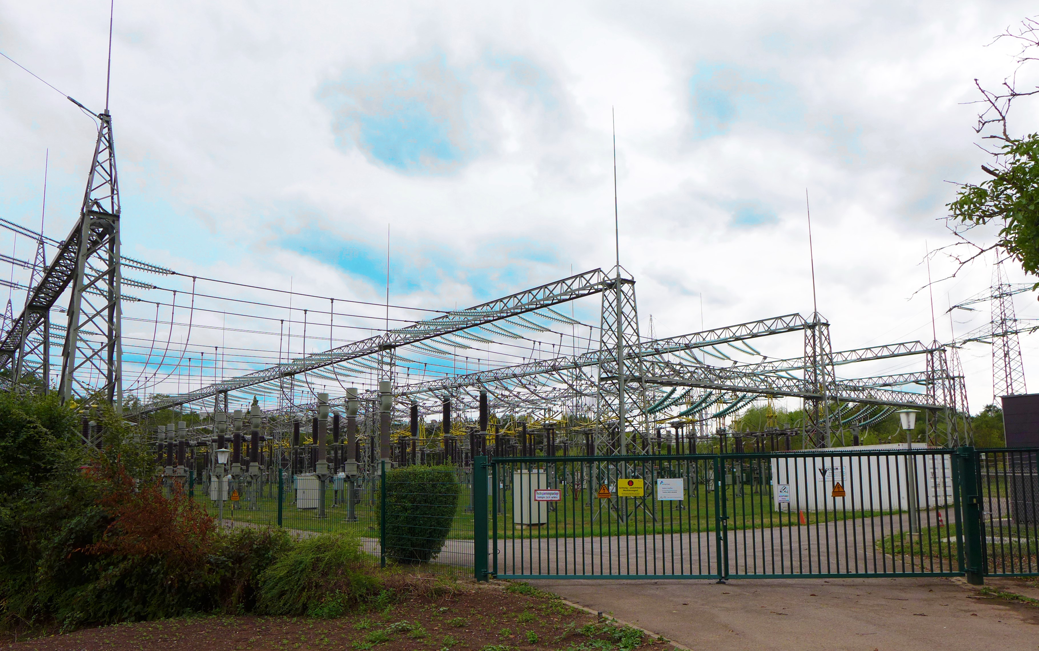 Diefflen, 220-kV-Schaltwerk (Amprion GmbH) zwischen Umgehungsstraße und Prims, Flur 8, Gewann „In den Bäuningen“